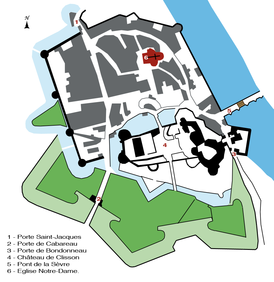 Clisson intramuros en 1809